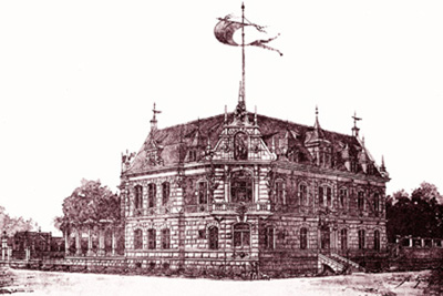 Bild des Bubenreuther Hauses